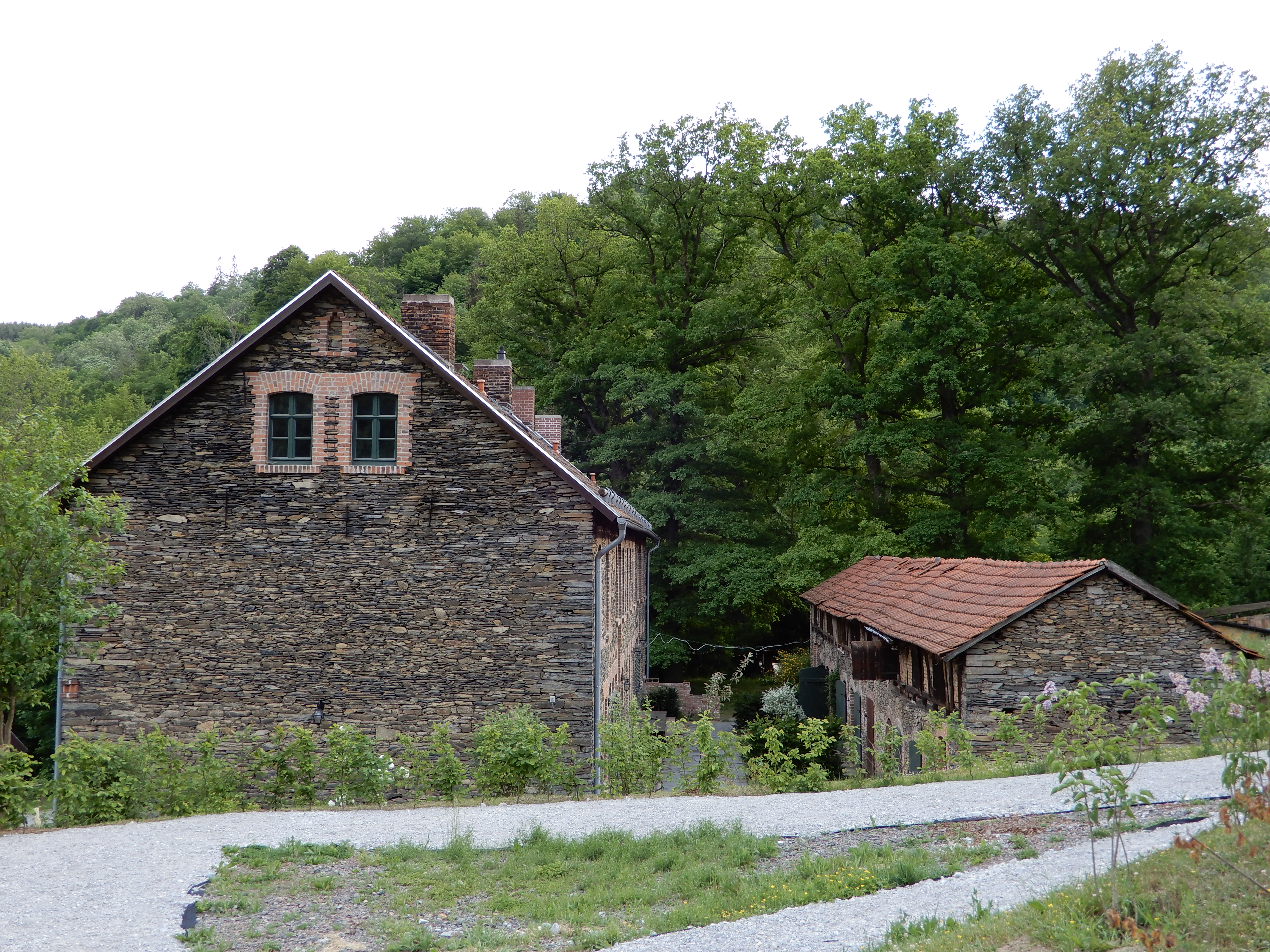 Haus III. Hammer Nr. 29